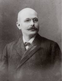 Alois Wessels (1864 - 1944), Český podnikatel.